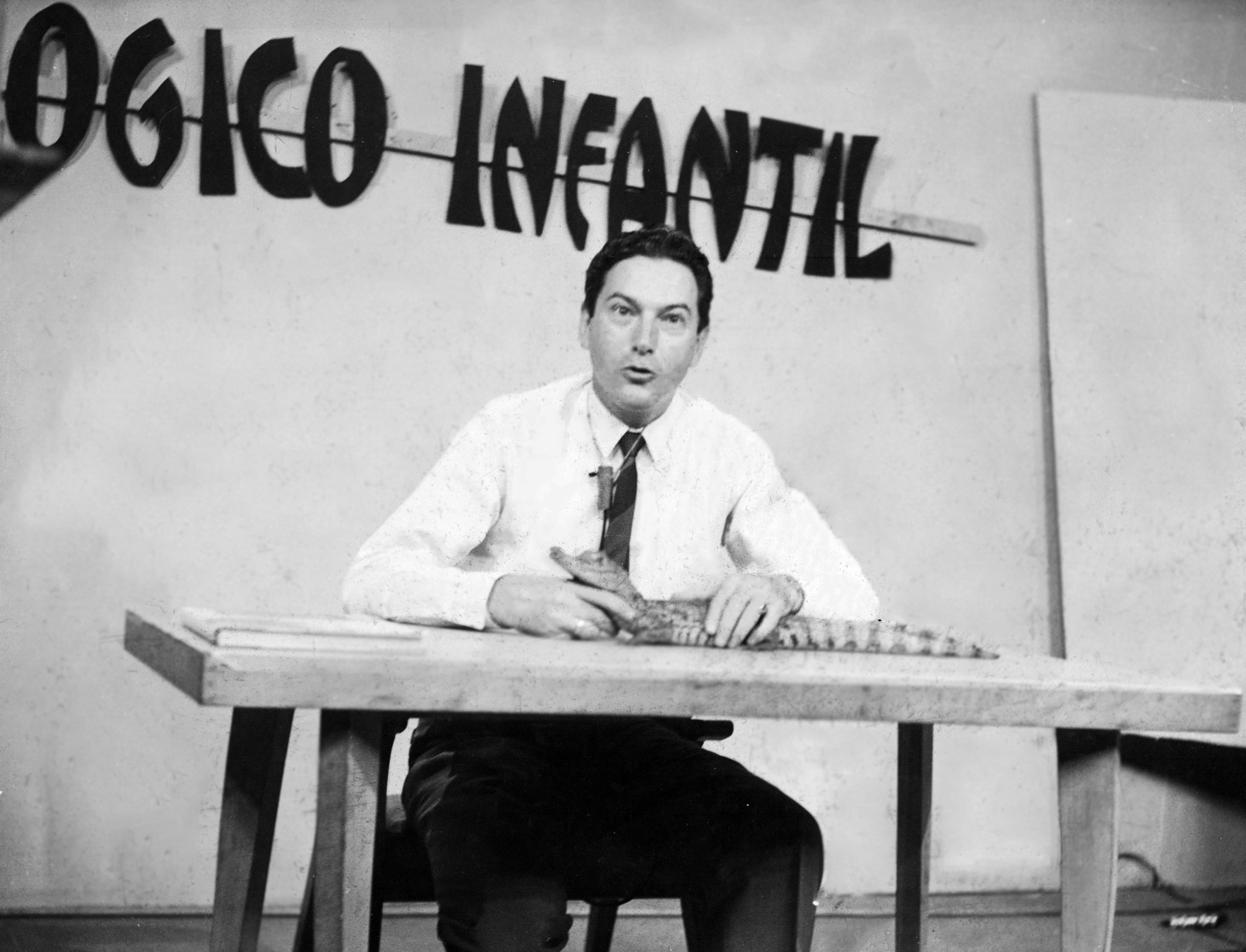 Pedro Trebbau durante su programa de televisión Zoológico Infantil.